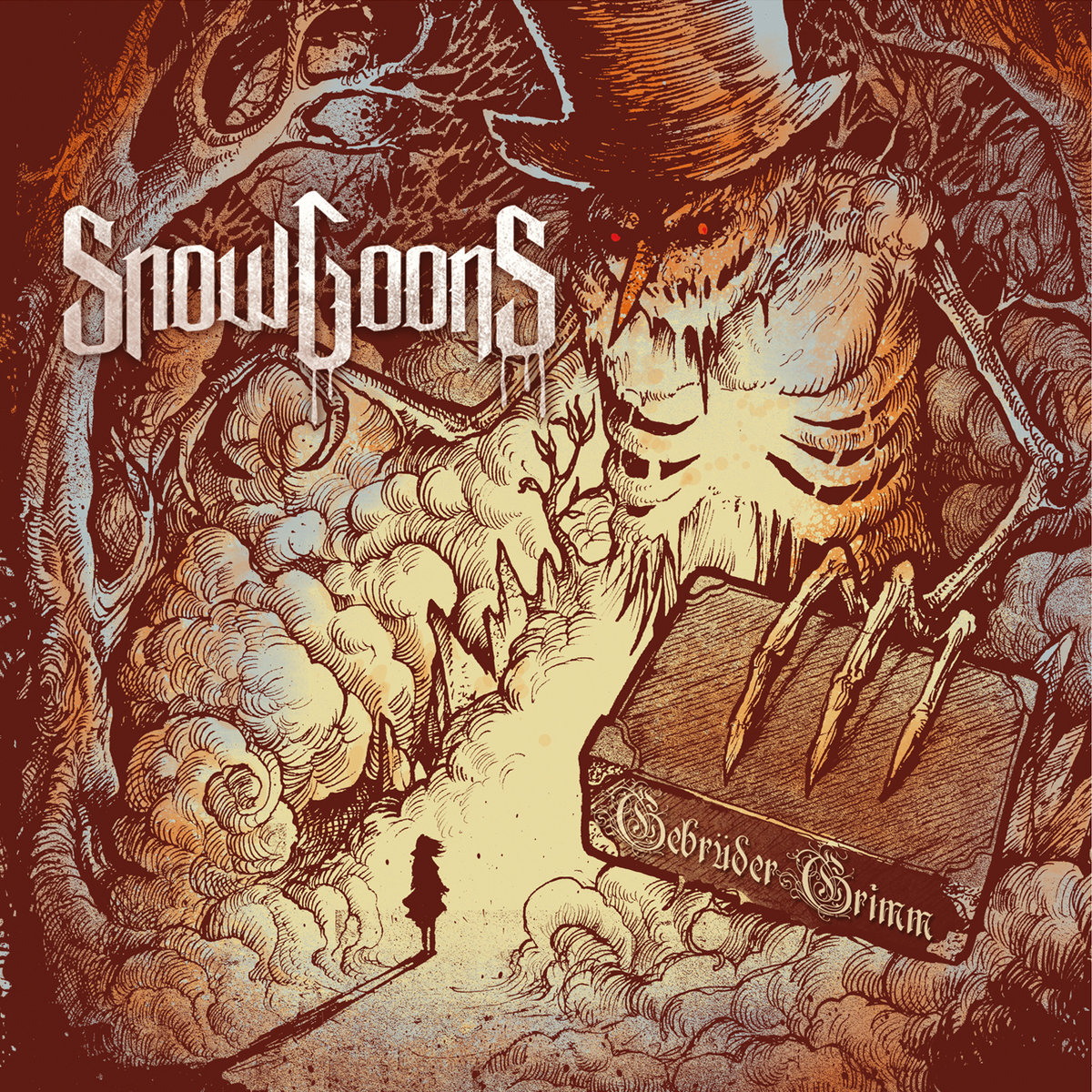 Cover des Albums "Gebrüder Grimm"